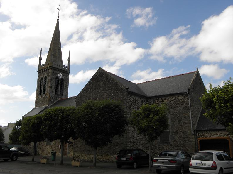 Église saint-Louis de Vildé-la-Marine, section de commune d'Hirel (35).